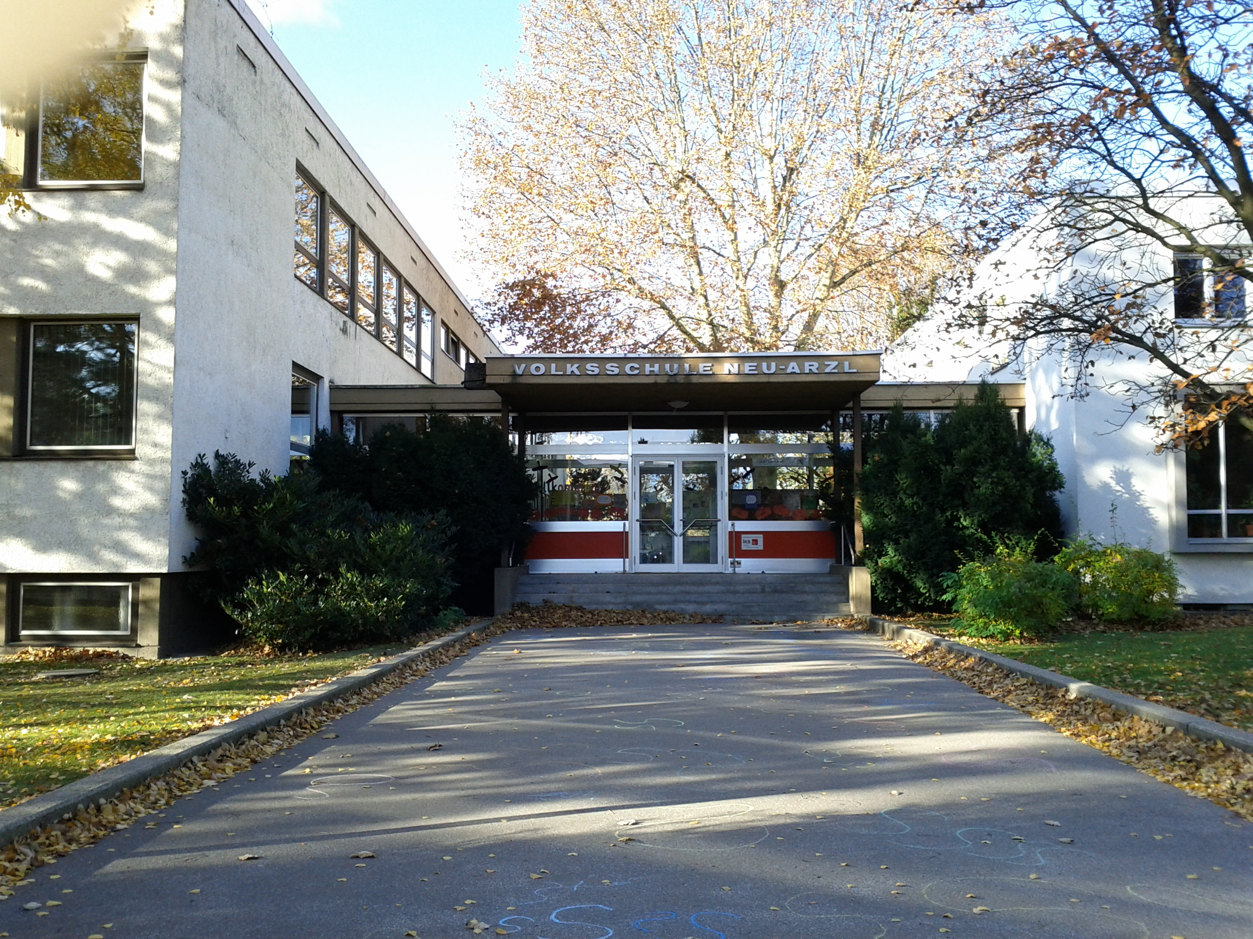 Volksschule Neu Arzl, Kunst-am-Bau - Rotadlerstraße 10, Innsbruck